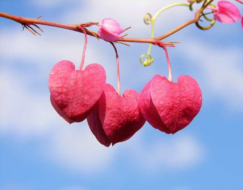 Dicentra sp.